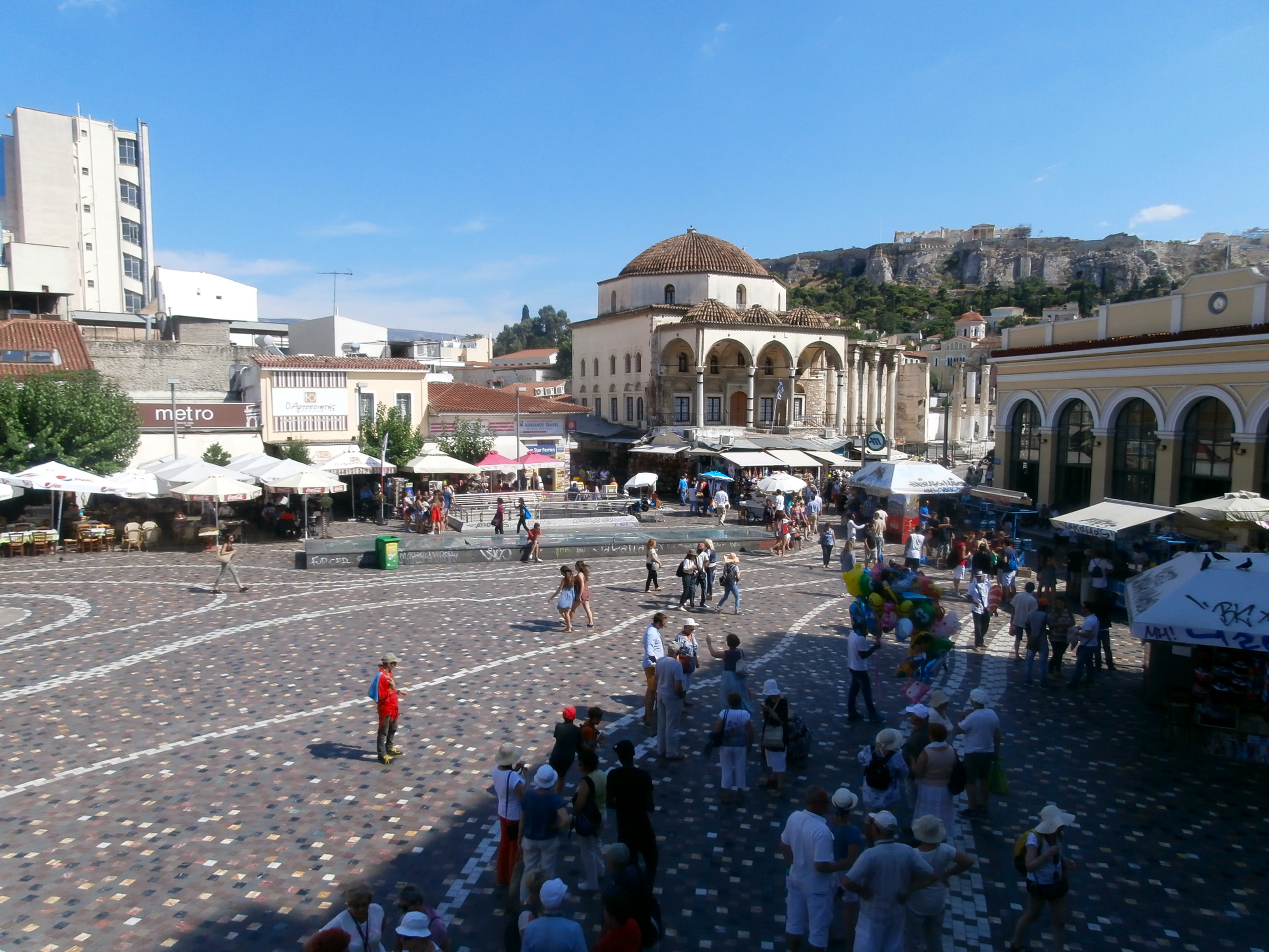 Monastiraki